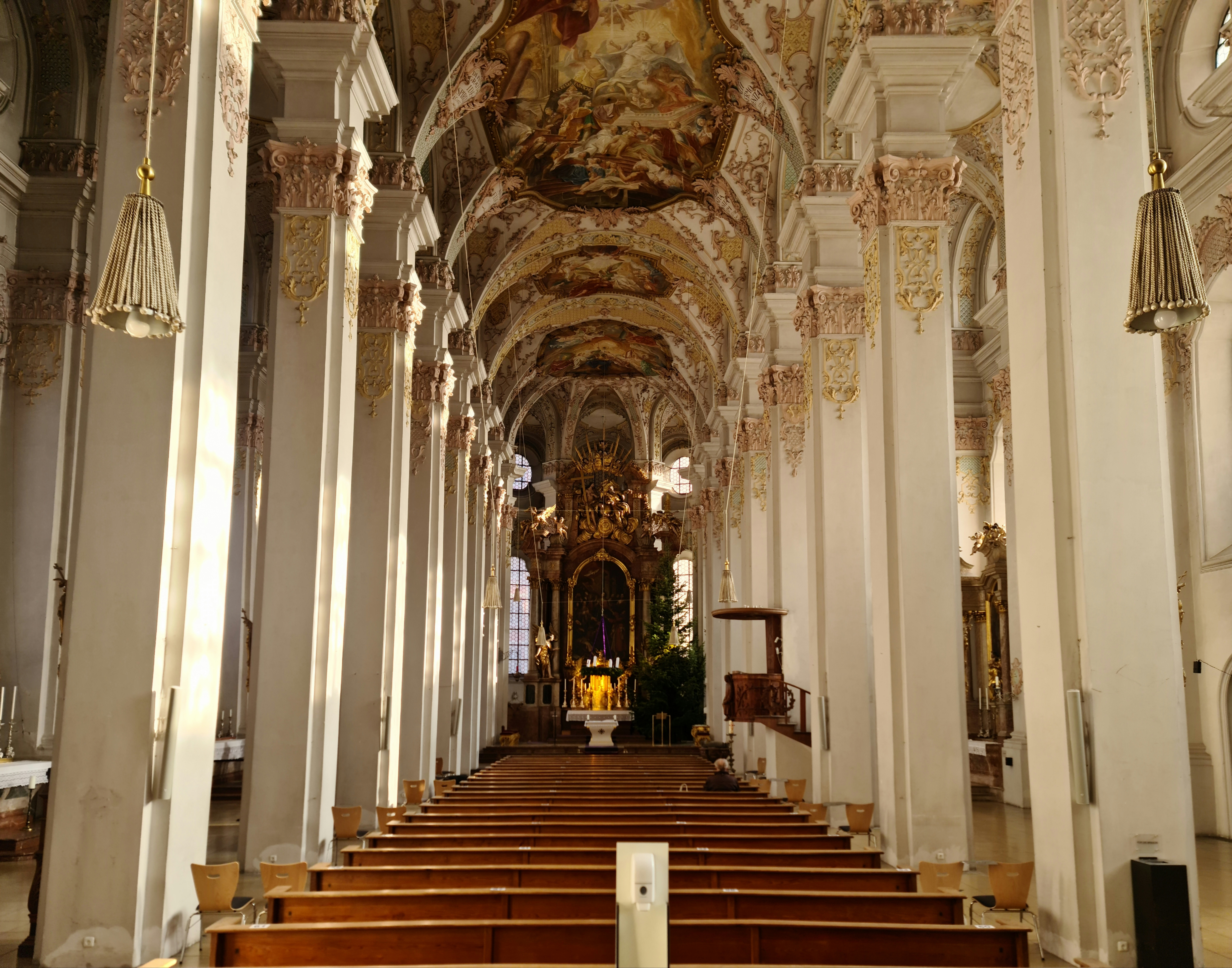 München, Hl. Geist, Innenraum mit Blick zum Chor.